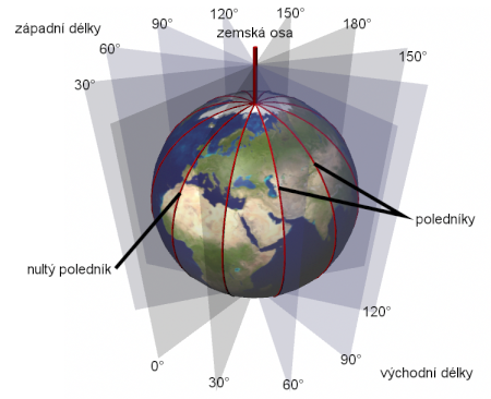 Diagram pro vysvětlení pojmu poledníků